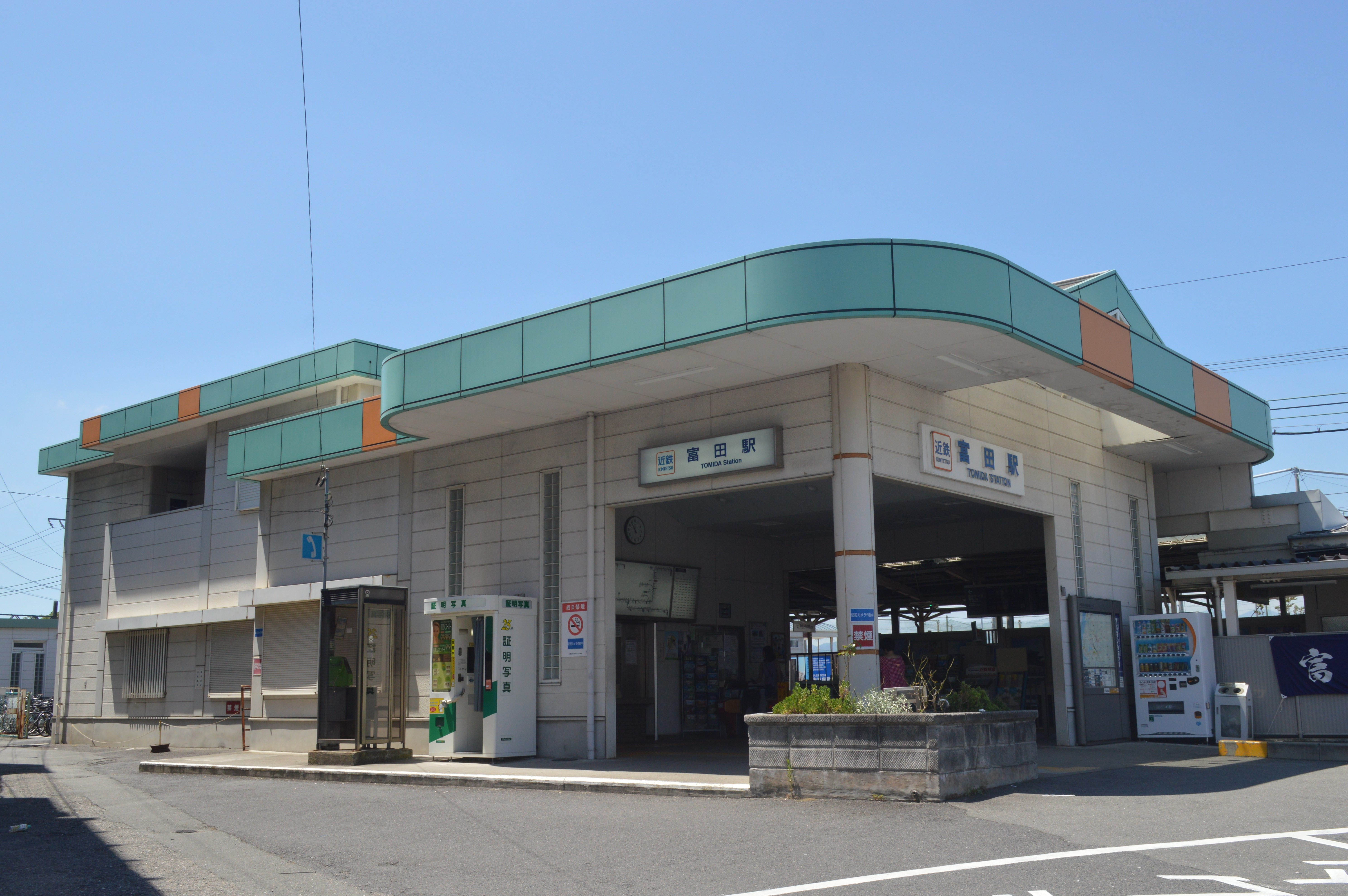 三重県四日市市にある近鉄富田駅。